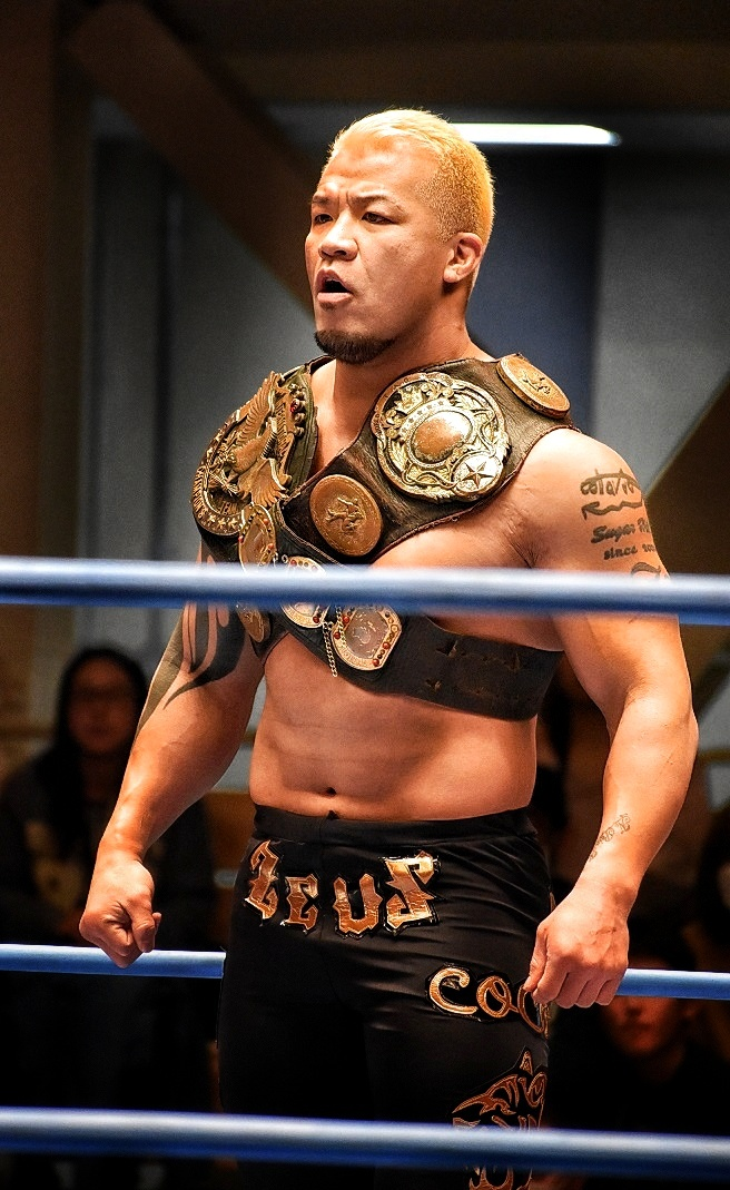 全日本プロレス所属のゼウス